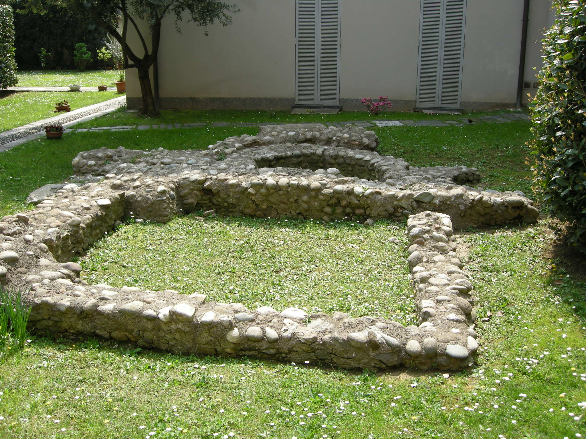 Duomo di monza, retro, scavi 0